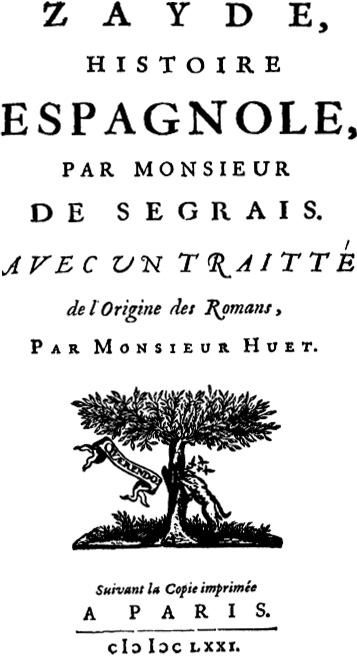 Cover page of Zayde by Marie-Madeleine Pioche de la Vergne, comtesse de la Fayette with Pierre Daniel Huet's Traité sur l'origine des romans